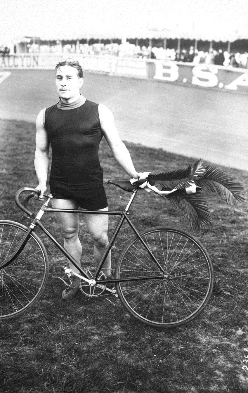 23-9-12, Buffalo, Maitrot (vainqueur de la course des boxeurs, arbitre)